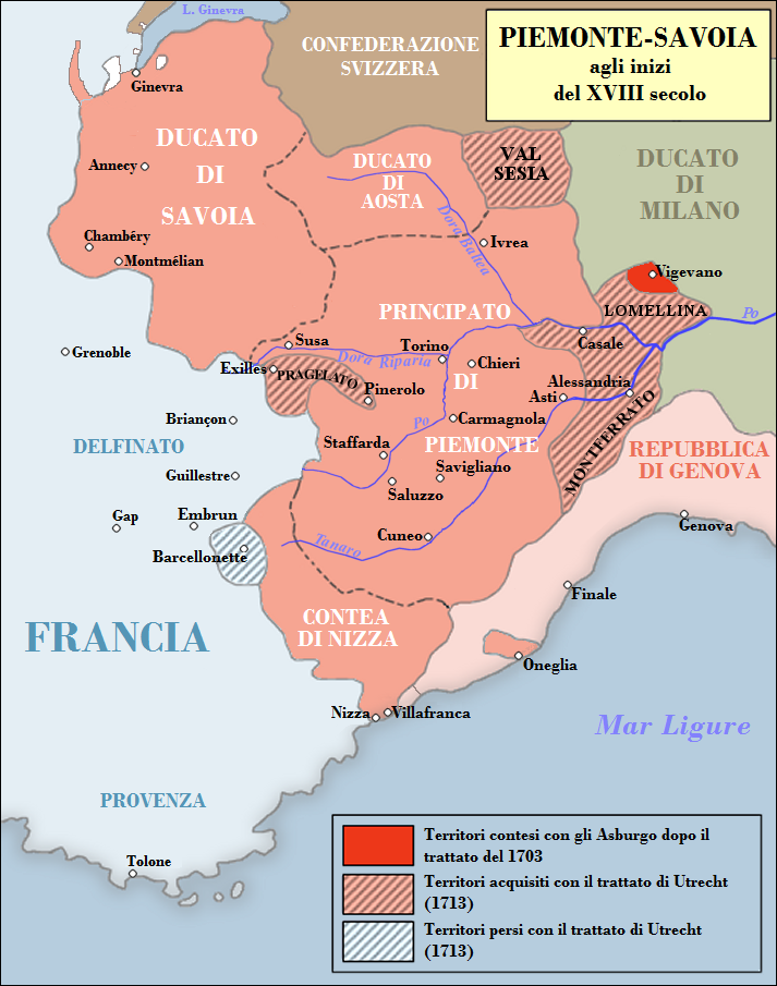 Possedimenti di Vittorio Amedeo II, Duca di Savoia.